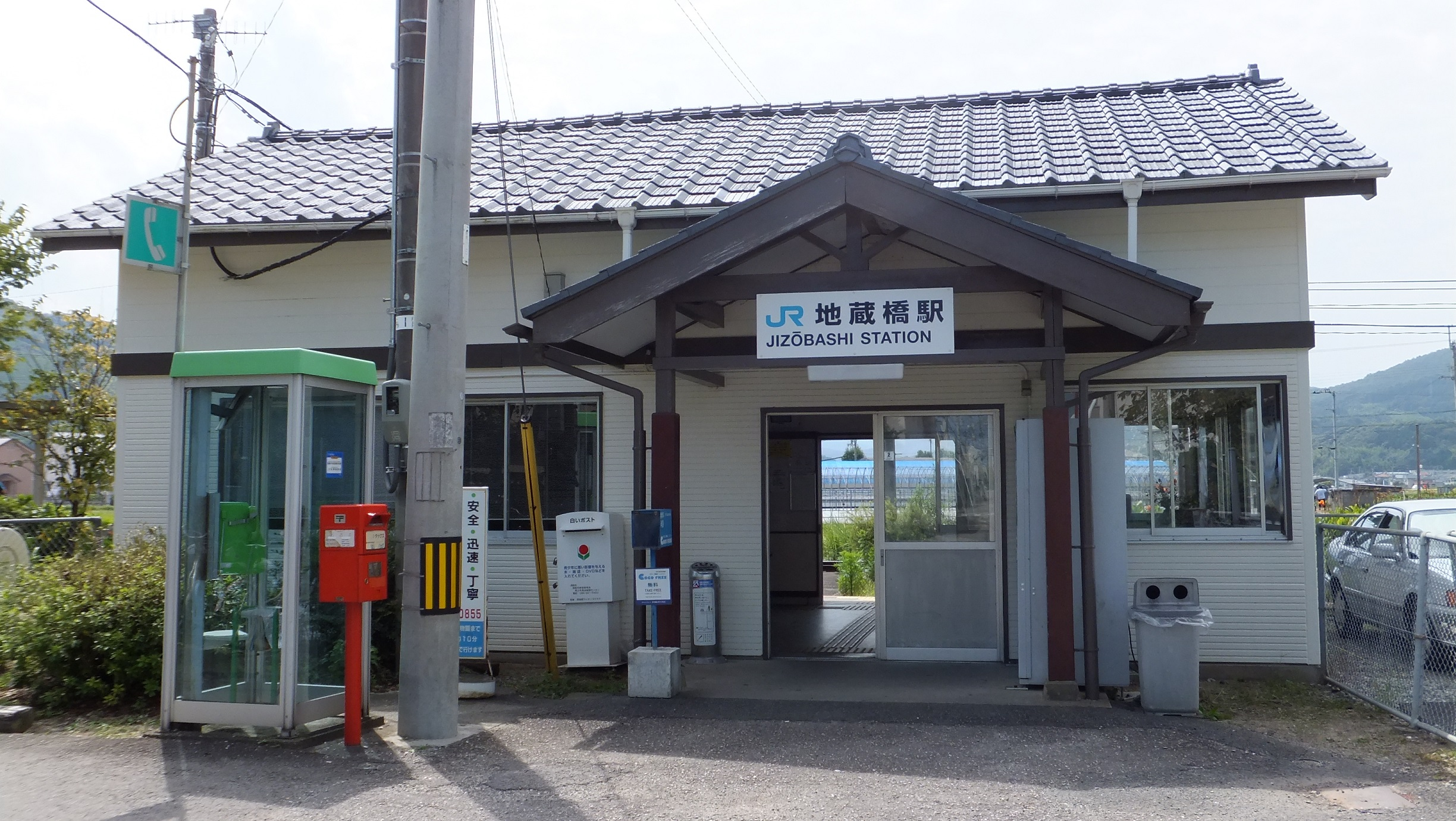 JR牟岐線 地蔵橋駅（2015年 徳島県徳島市）